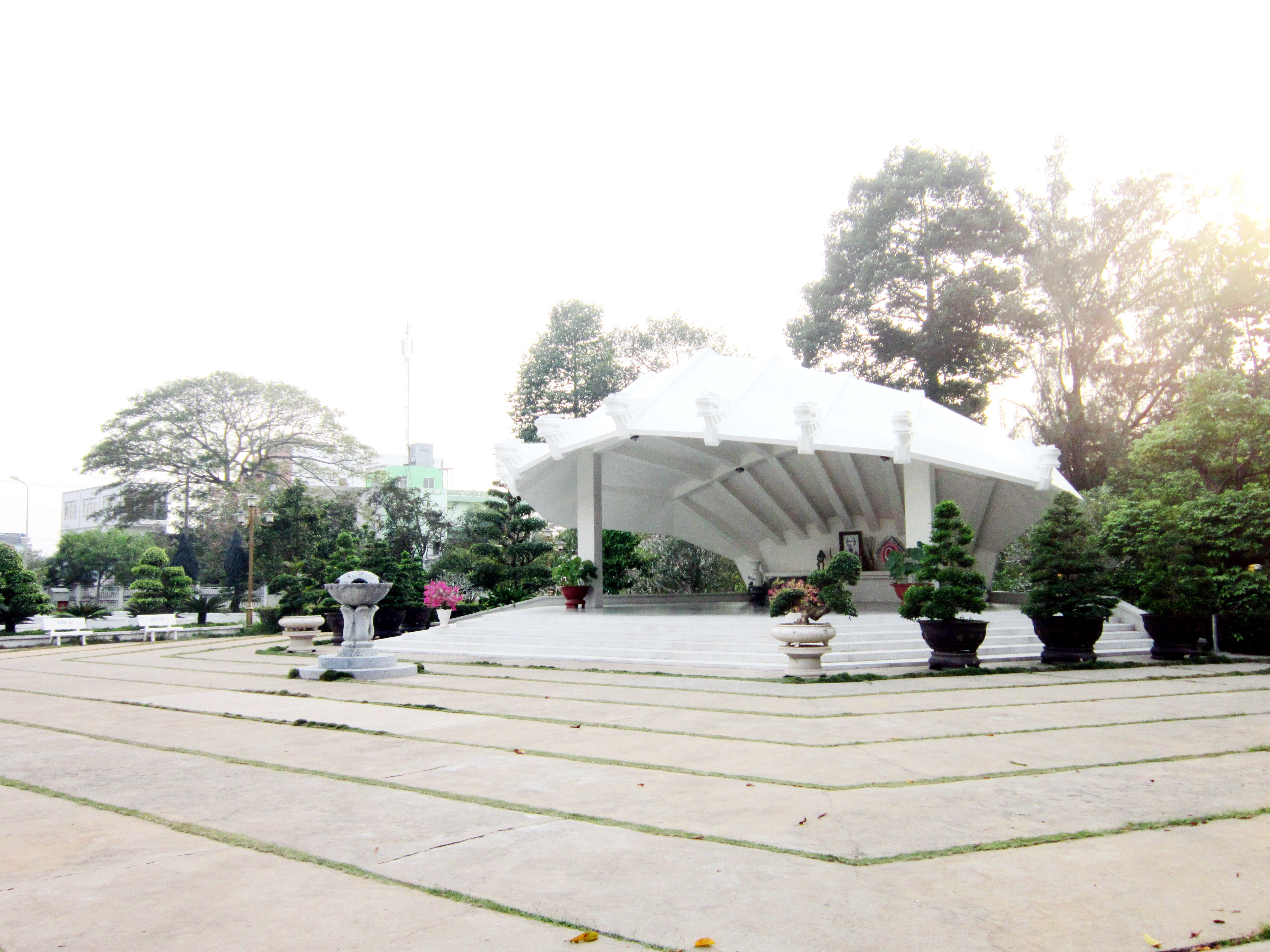 Mộ Nguyễn Sinh Sắc (1862–1929) trong Khu di tích Nguyễn Sinh Sắc tọa lạc số 123/1 Phạm Hữu Lầu, thuộc phường 4, thành phố Cao Lãnh, tỉnh Đồng Tháp, Việt Nam.